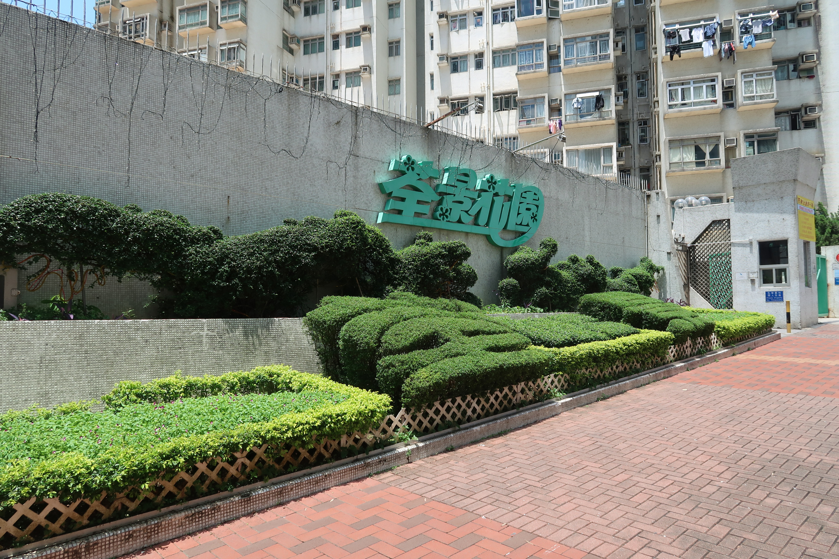 Tsuen King Garden Entrance